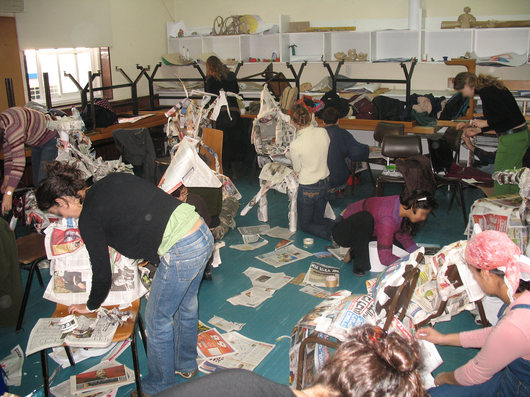 טיפול באמנות בקבוצה. עבודה משותפת בחלל אחד